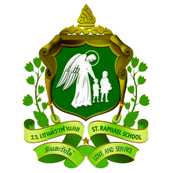 ตราสัญลักษณ์ของ โรงเรียนเซนต์ราฟาแอล อย่างเป็นทางการ